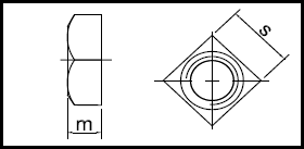 DIN 557